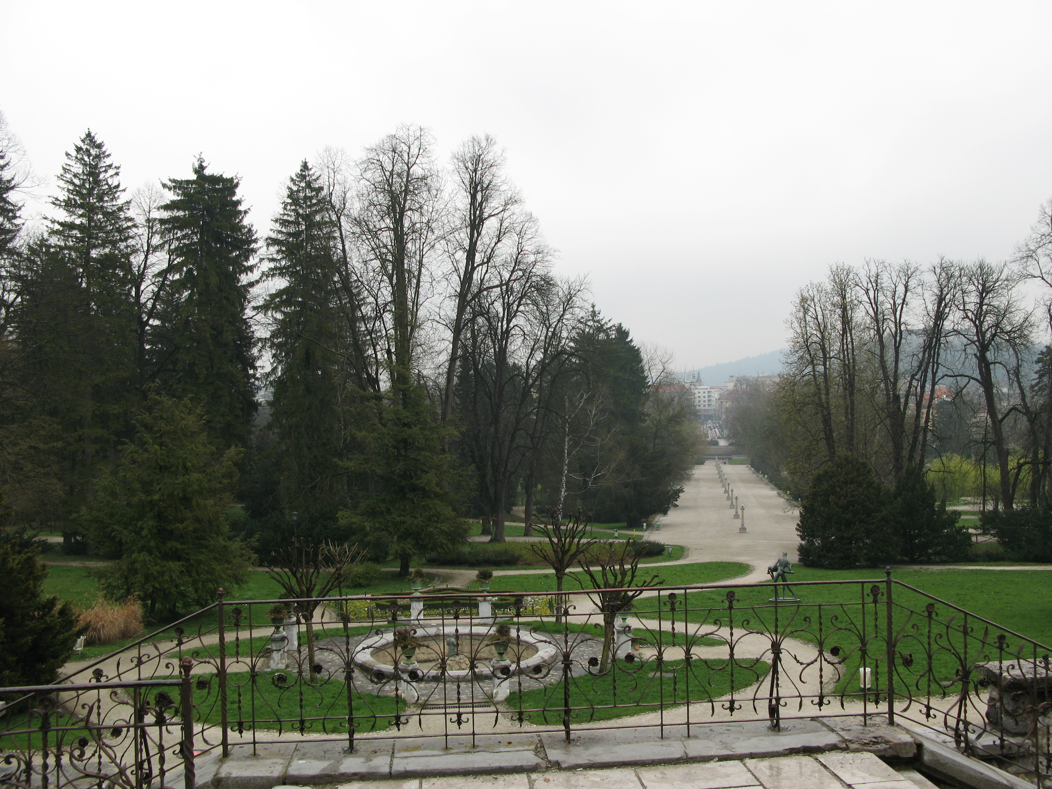 Ljubljana